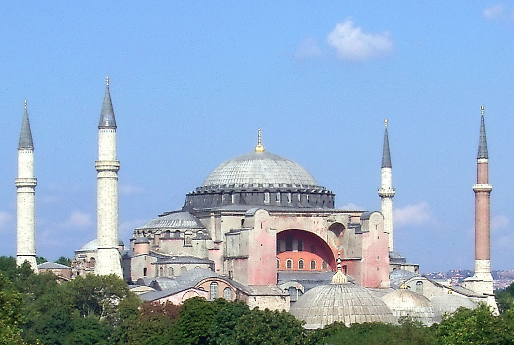 Eine der bekanntesten Bauten der Spätantike: die Hagia Sophia (Baubeginn 325), nach einem Brand wieder neu errichtet unter Justinian I.